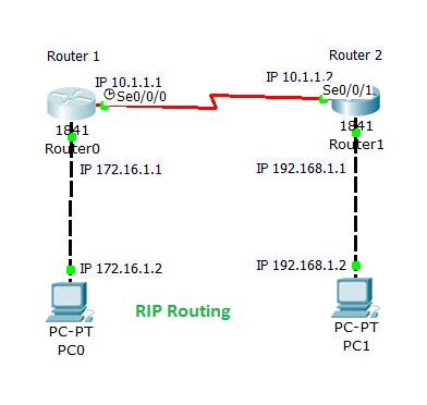 Монгол: rip топологи